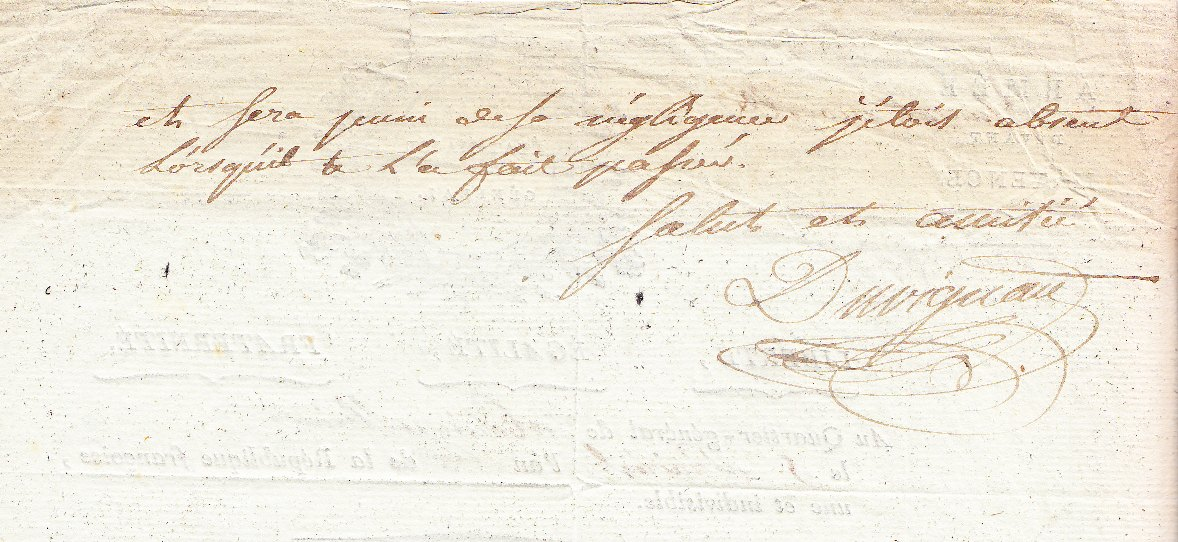 Signature Autographe